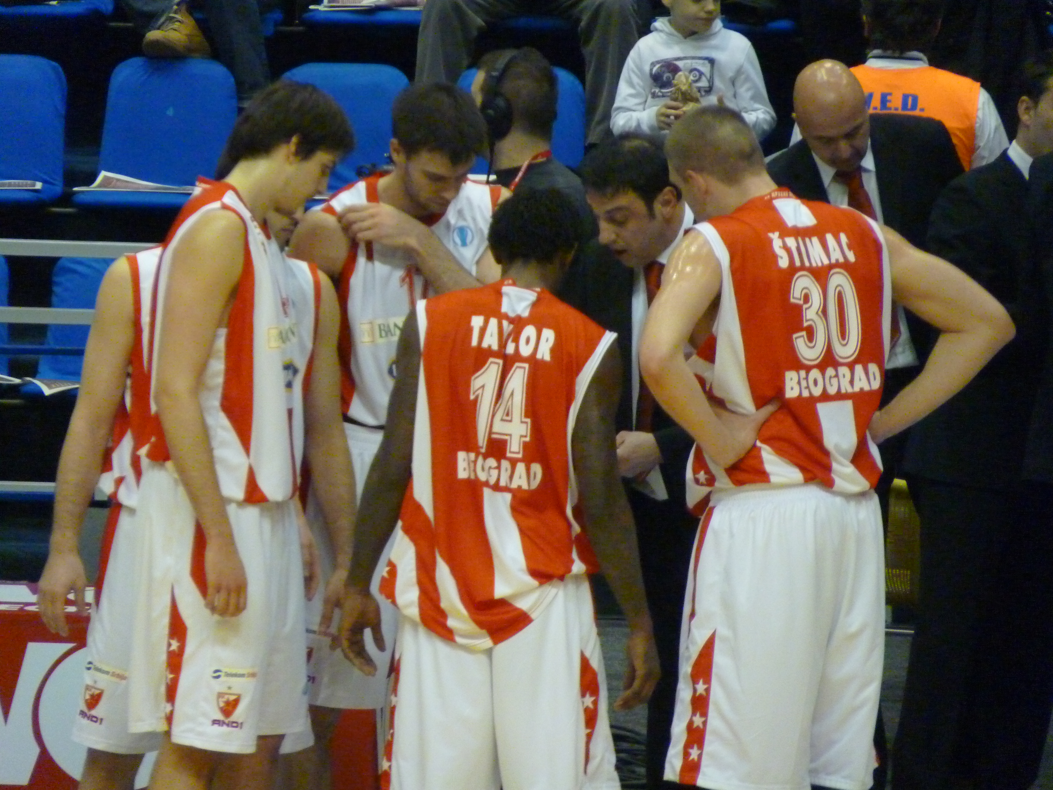 Crvena zvezda